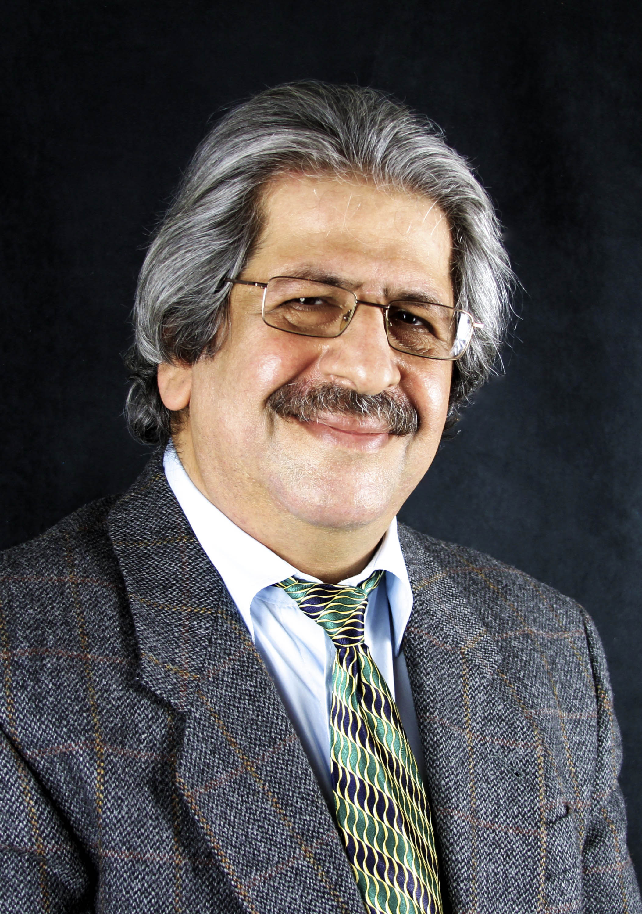 علی شکوری